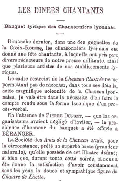 Les quatre premiers paragraphes du début d'un article rapportant une fête chantante à Lyon organisée par la goguette des Chansonniers lyonnais.